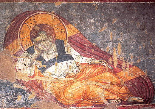 Спас Недреманное Око Фреска собора Протата в Карее, Афон.